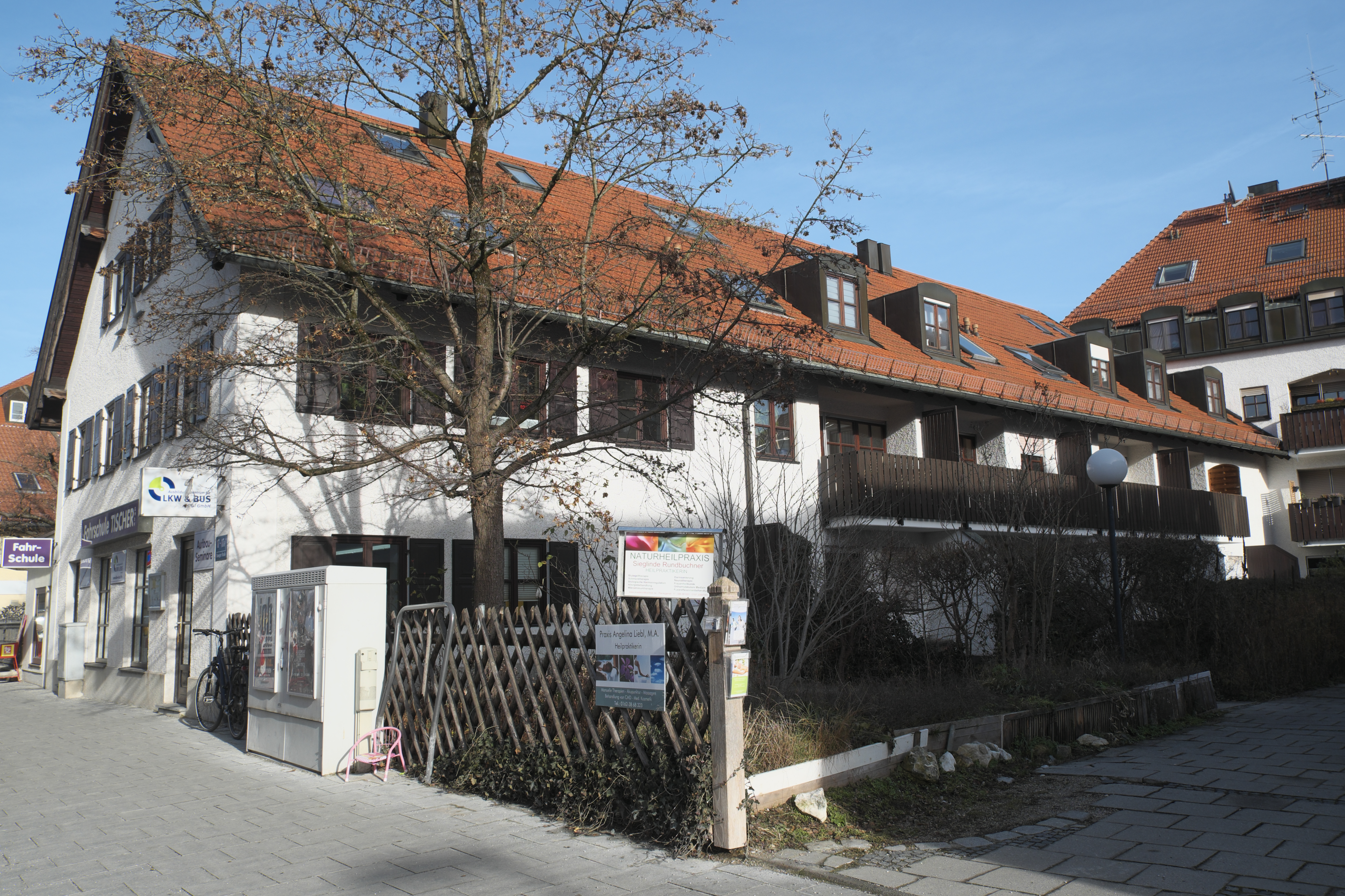 Ehemaliges Bauernhaus, Planegger Straße 17, in Pasing im Stadtbezirk Pasing-Obermenzing in München (Bayern/Deutschland)